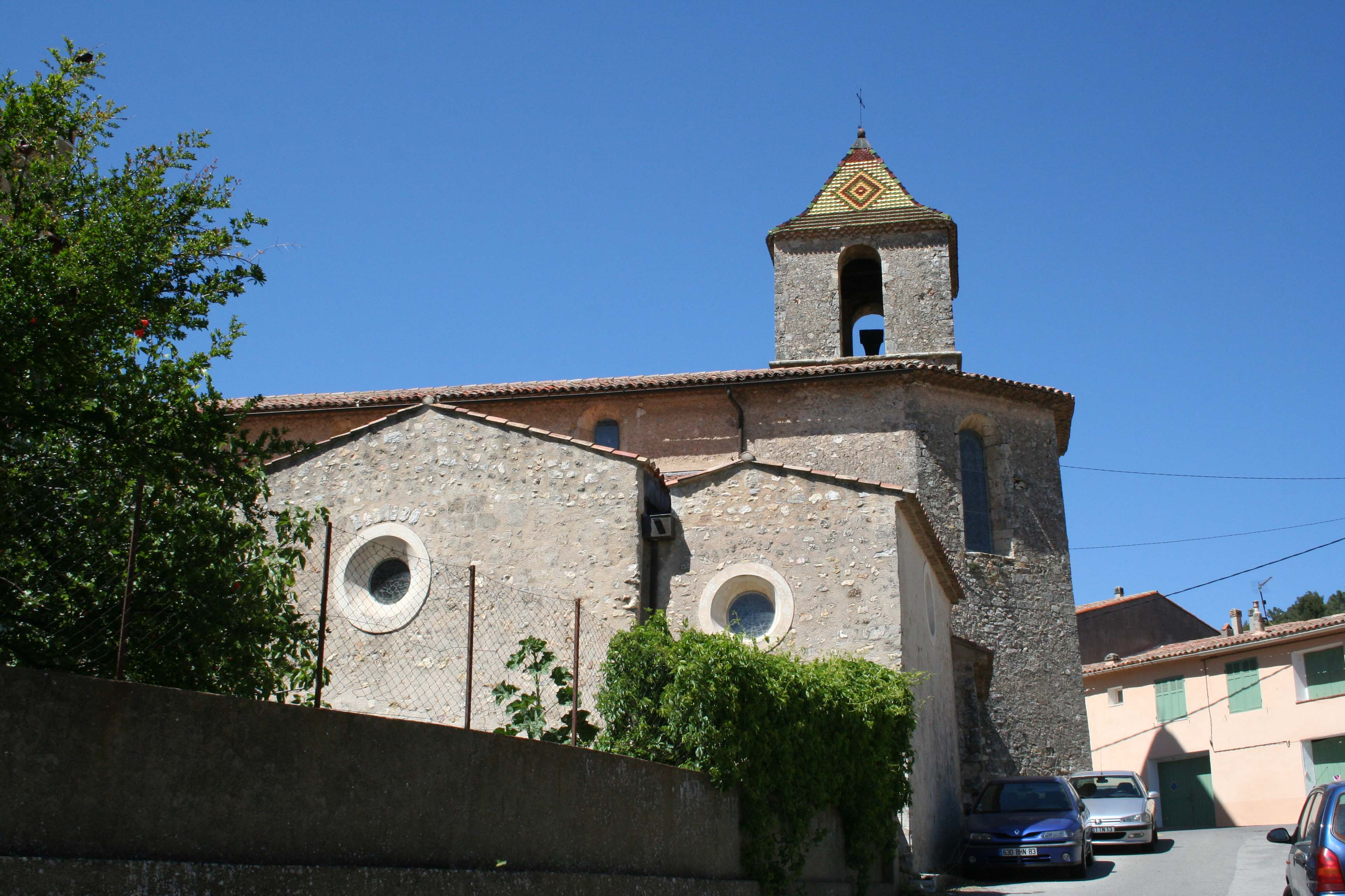 église Notre-Dame de Nazareth à Varages (Var).